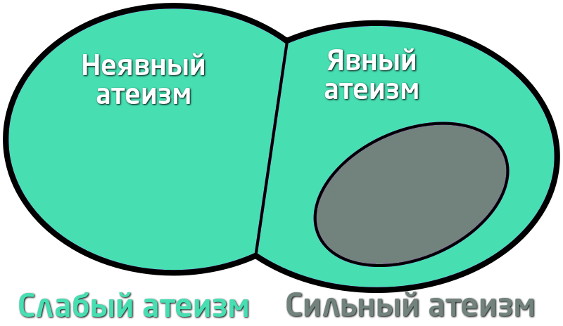 Круги Эйлера показывают соотношение между слабым и сильным атеизмом и явным и неявным атеизмом. Сильный атеизм всегда явный, а слабый атеизм - неявный. В то же время явный атеизм может быть слабым или сильным.